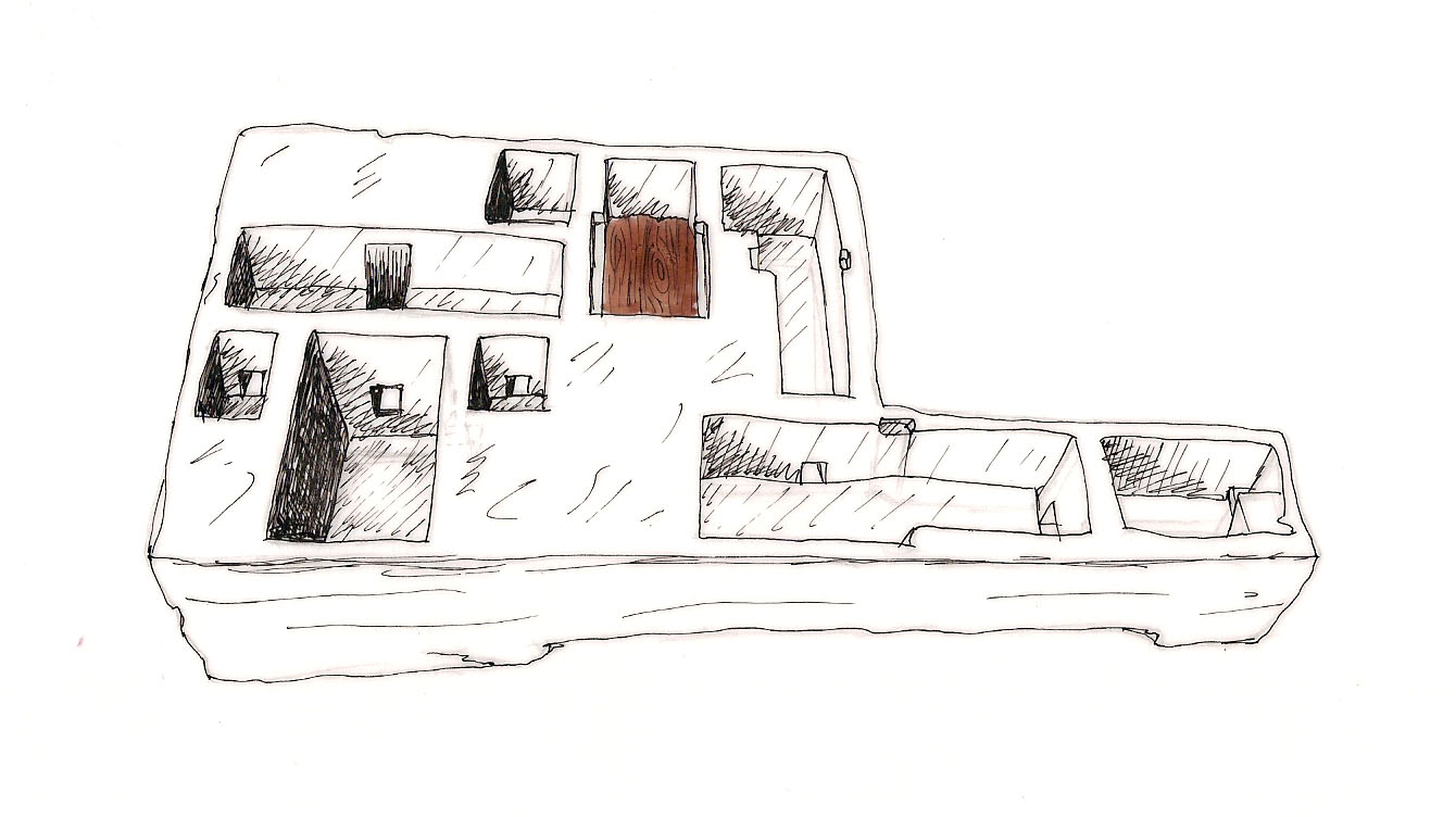 Maquette des infrastructures de la pyramide de Hawara ( trouvée dans le sol du complexe funéraire de amenemhat III à Dahchour)